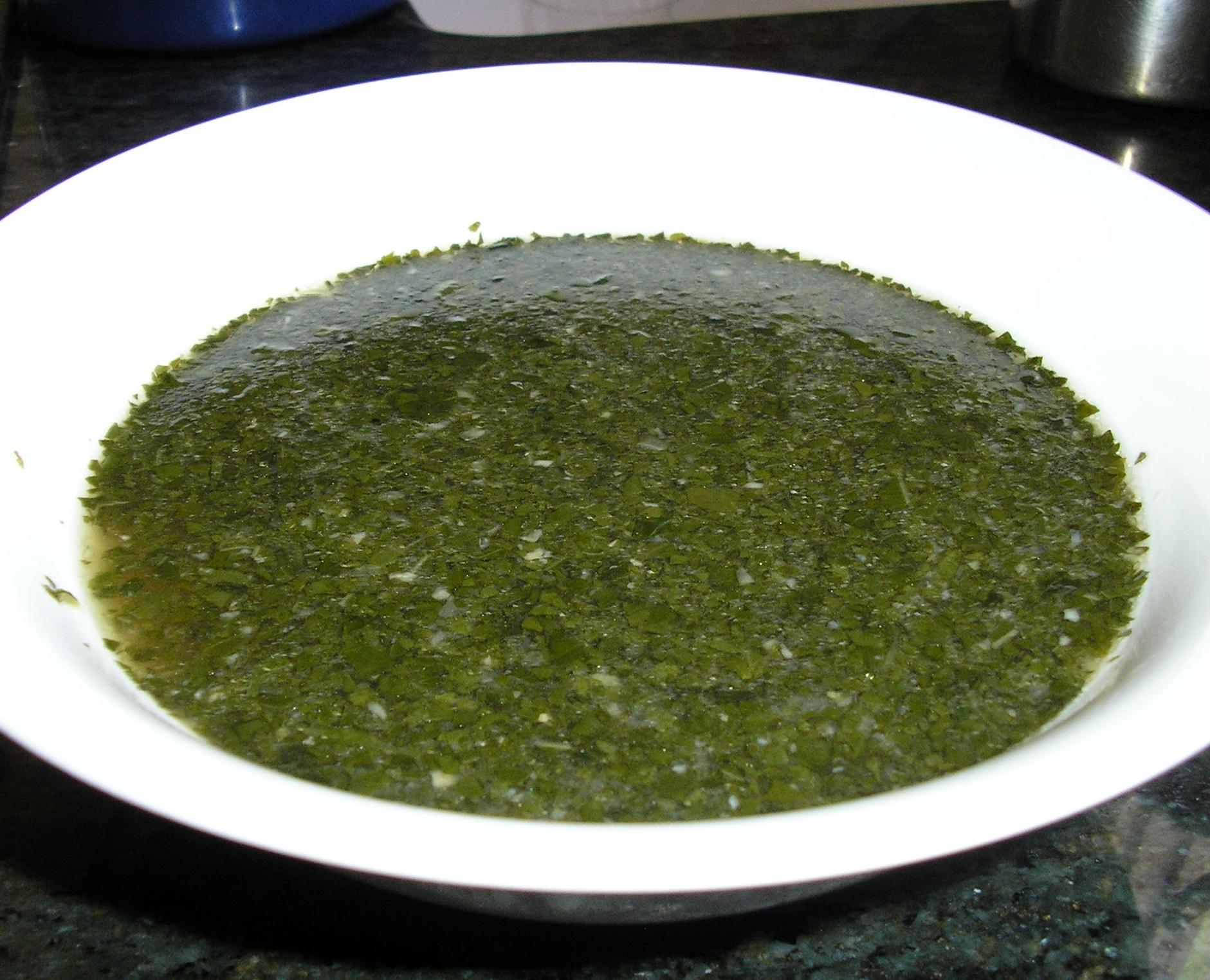 Molokheya